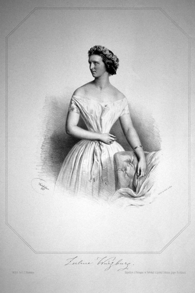 Zerline Gabillon, Ehefrau von Ludwig Gabillon, Lithographie von Josef Kriehuber, 1855